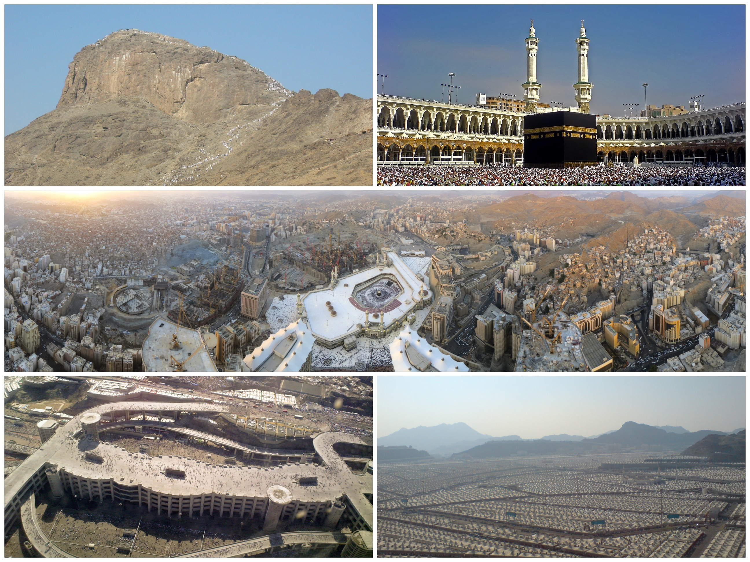 مونتاج لمدينة مكة.